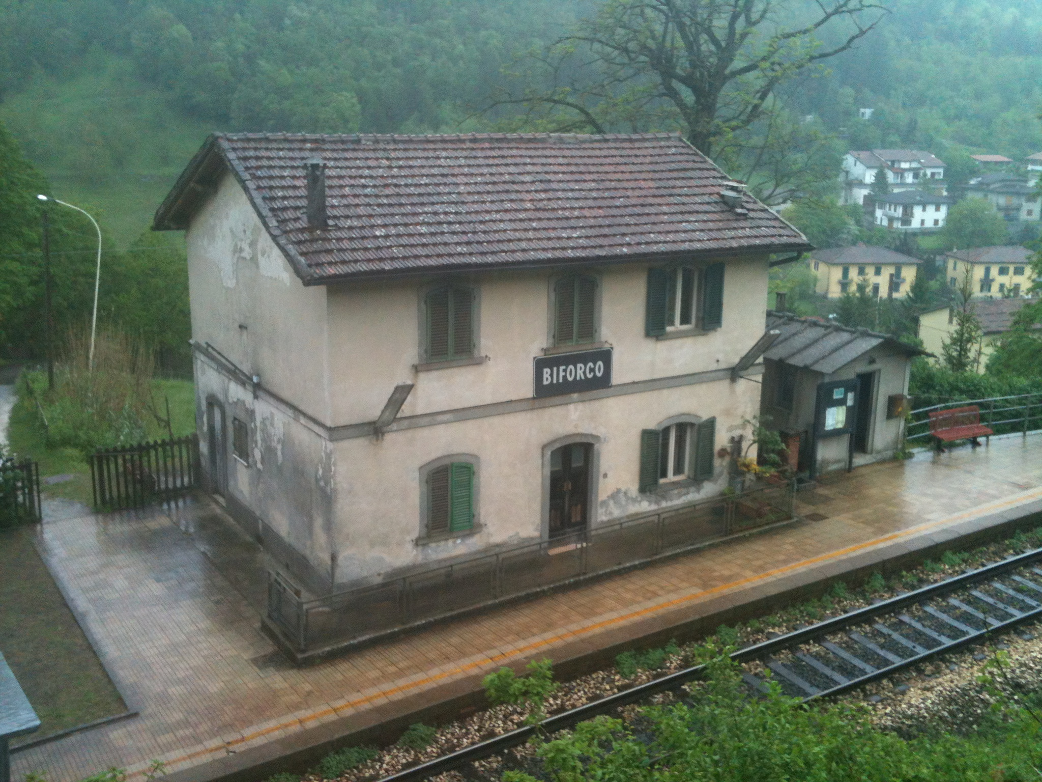 Stazione di Biforco (Marradi - FI)